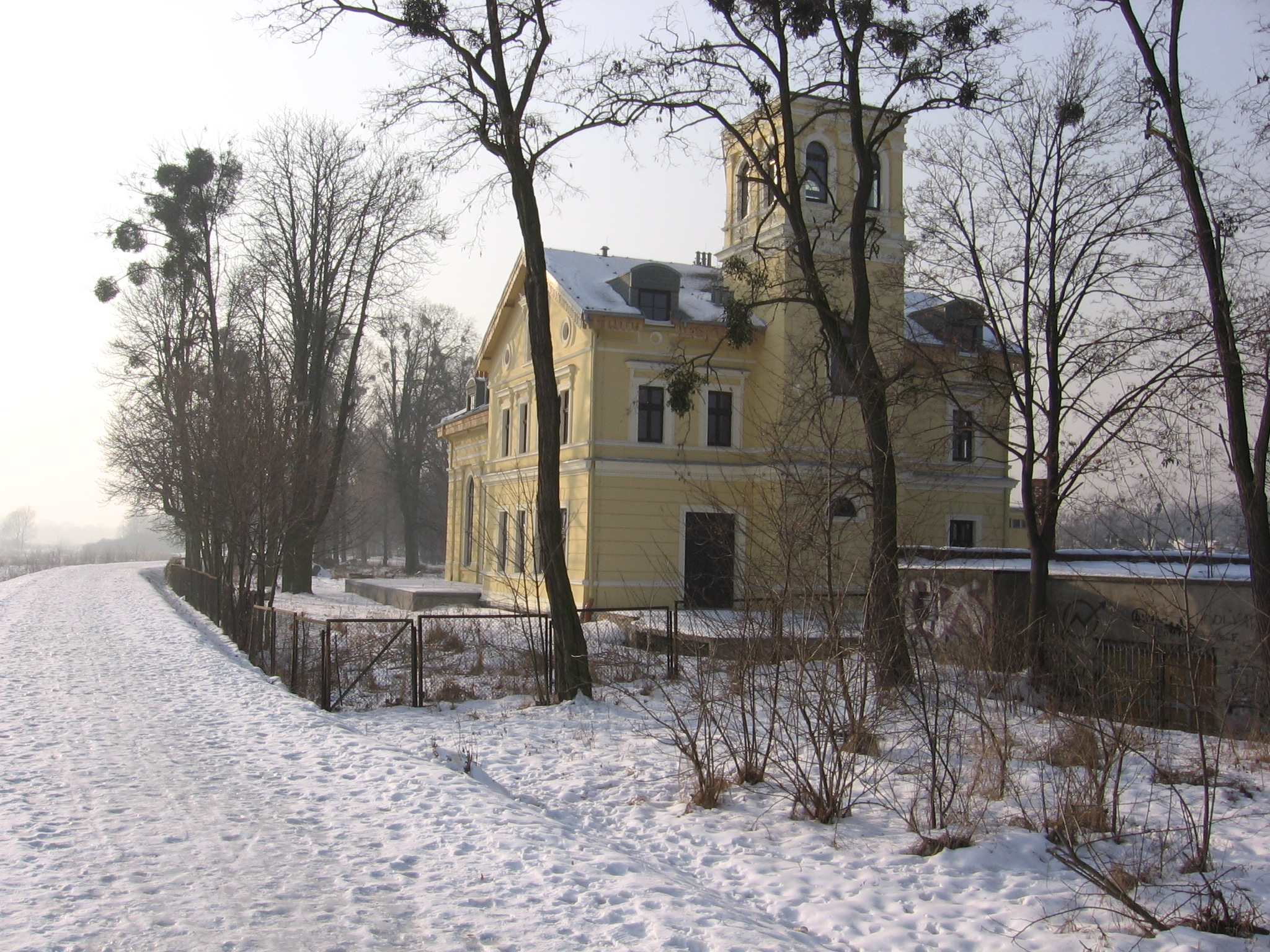 Établissement Wilhelmshafen przy Grobli Szczytnicko-Bartoszowickiej we wrocławskich Bartoszowicach, obok śluzy Bartoszowickiej